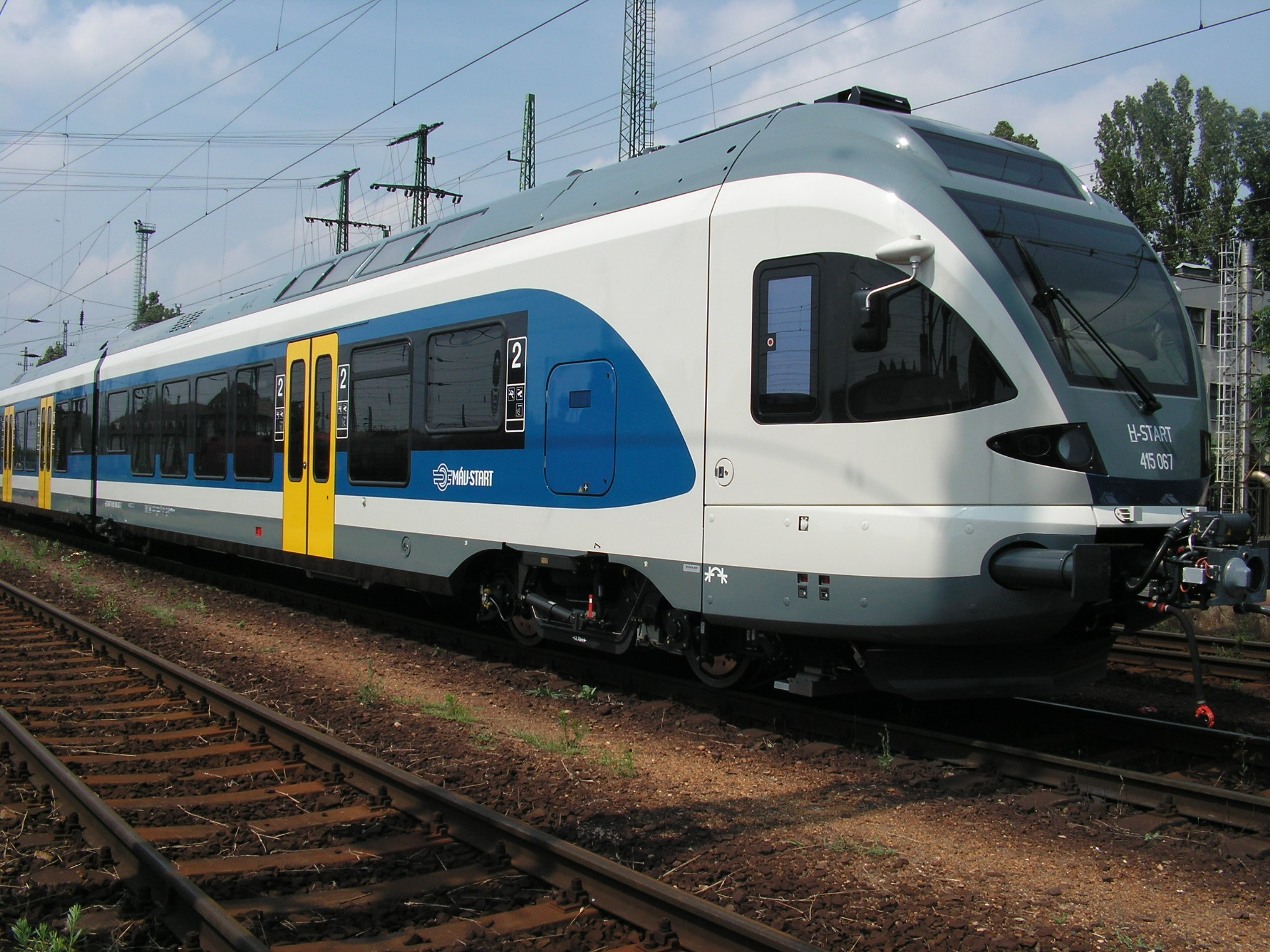 Próbaúton a MÁV új FLIRT szerelvénye, immár a MÁV színeiben pompázik (H-START 415 067 + 068)